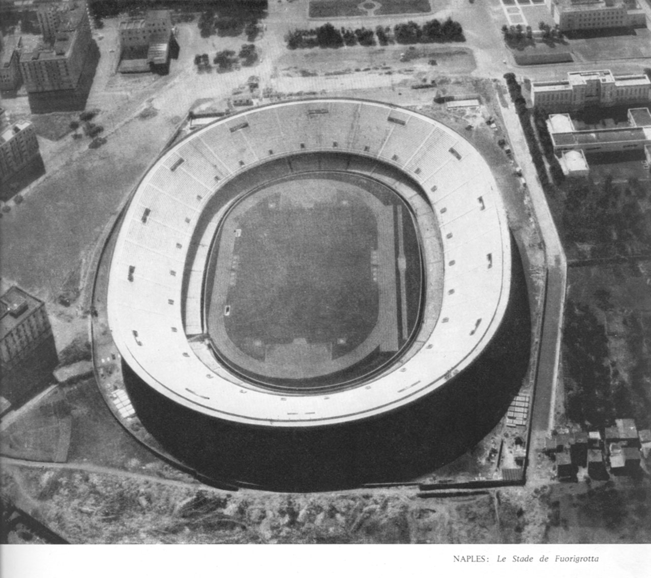 Lo stadio di Fuorigrotta (San Paolo) di Napoli nel 1963.